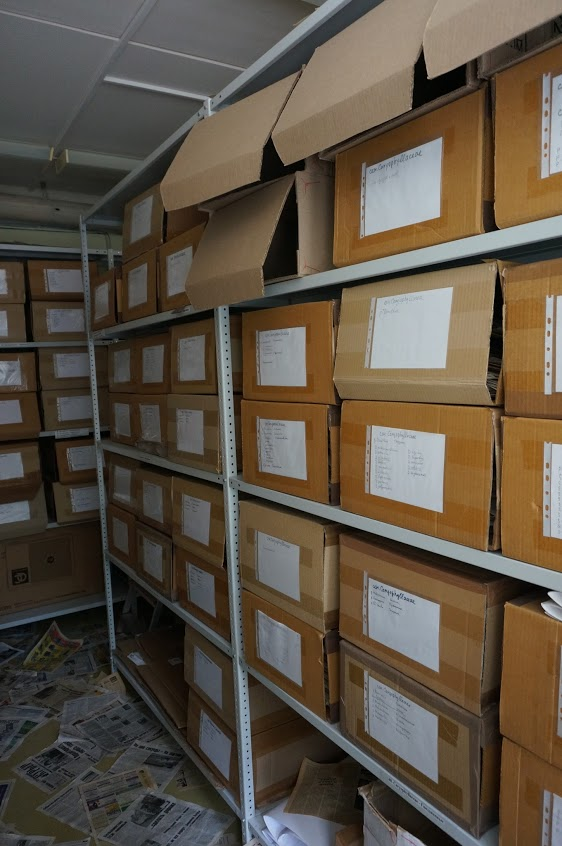 Гербарий лаборатории проблем фиторазнообразия (PVB), около 20 000 образцов сосудистых растений.